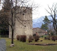 ილია ჭავჭავაძის სახ. სახლ-მუზეუმი, საგვარეულო კოშკი